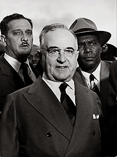 Getulio Vargas e Seguranças do DFSP